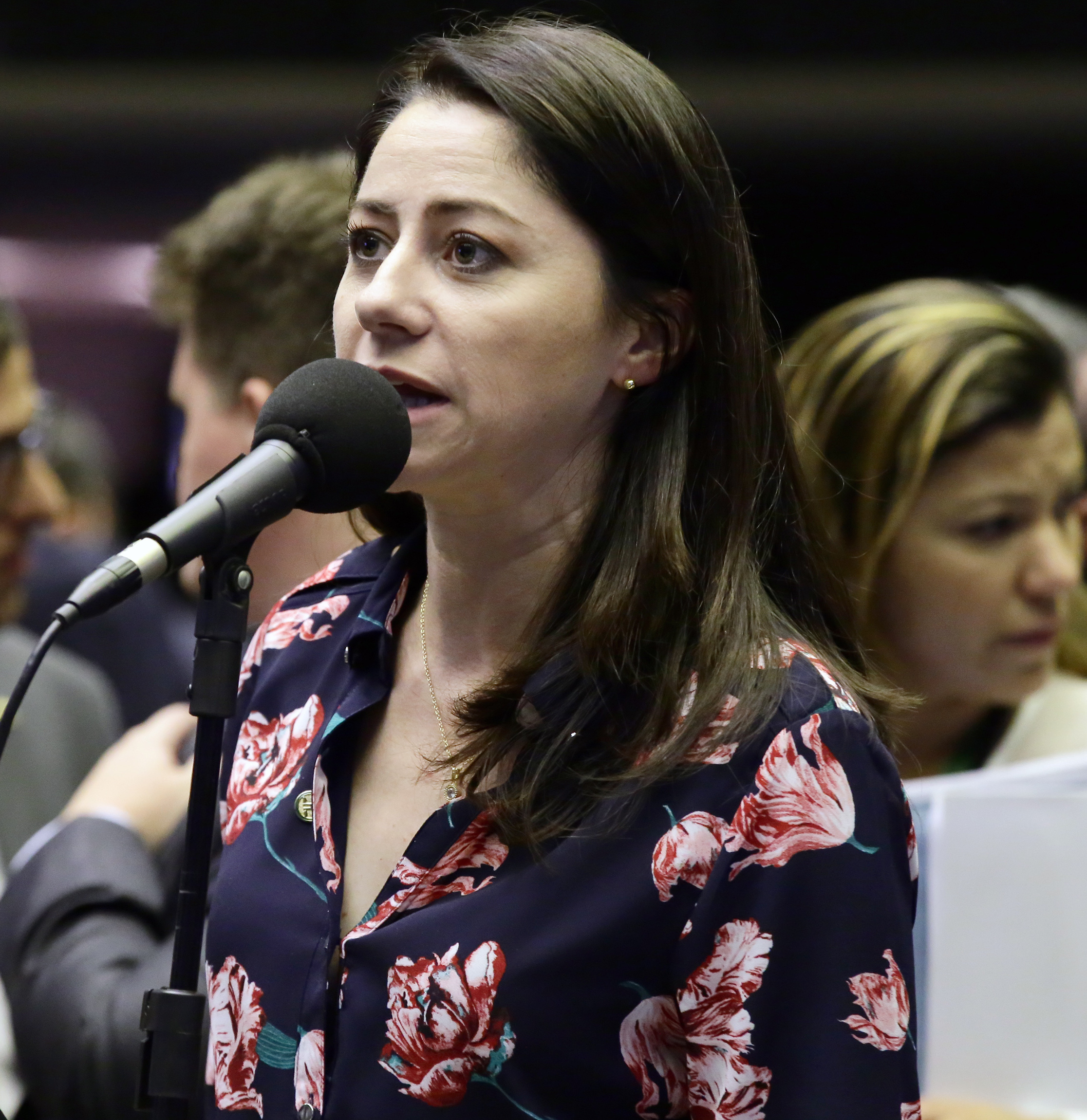 Liziane Bayer em março de 2019.